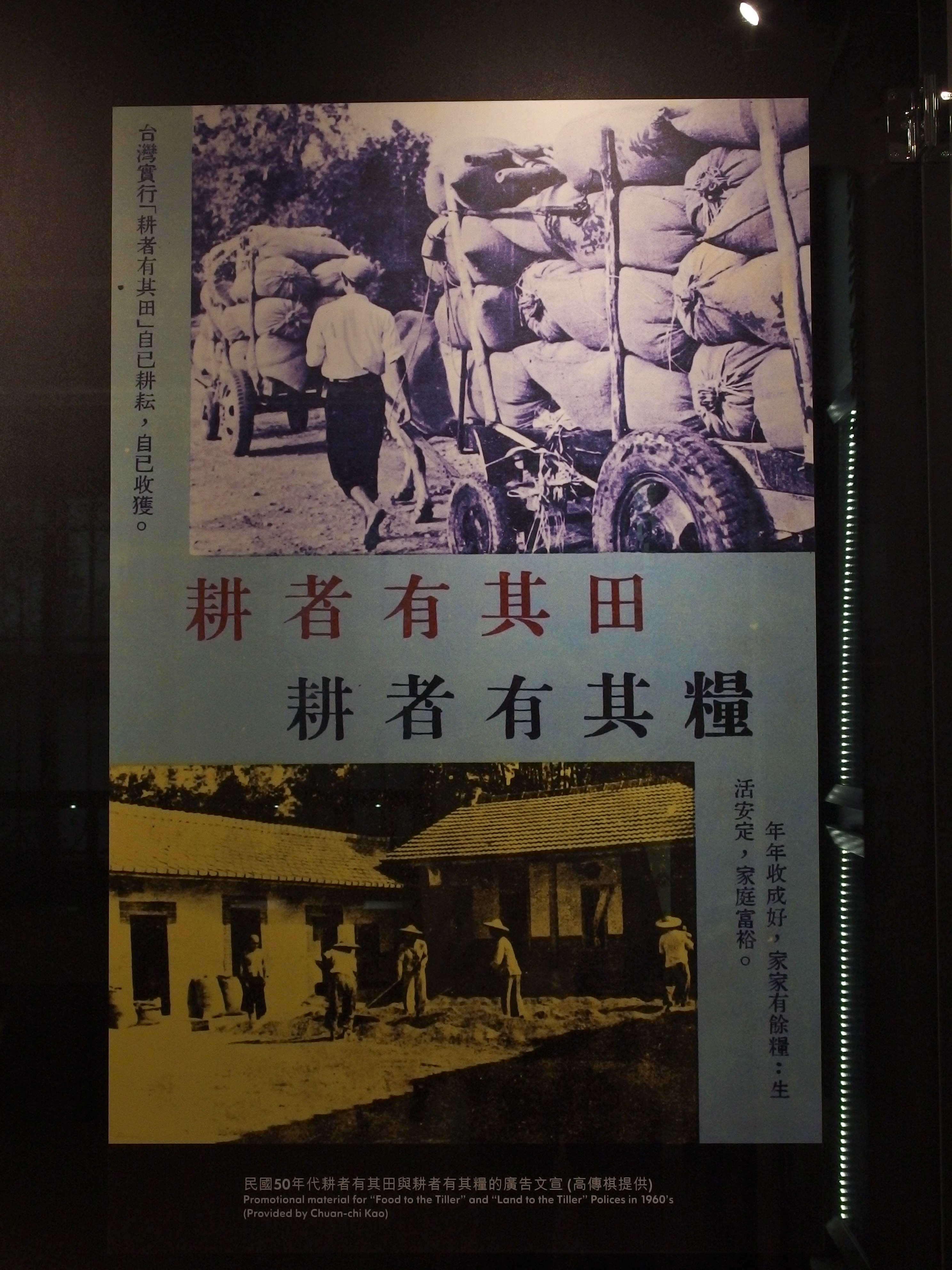 耕者有其田 耕者有其權 海報